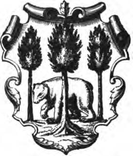 Холмщина, герб. Из гербовника Каспера Несецкого. Издание 1839 года